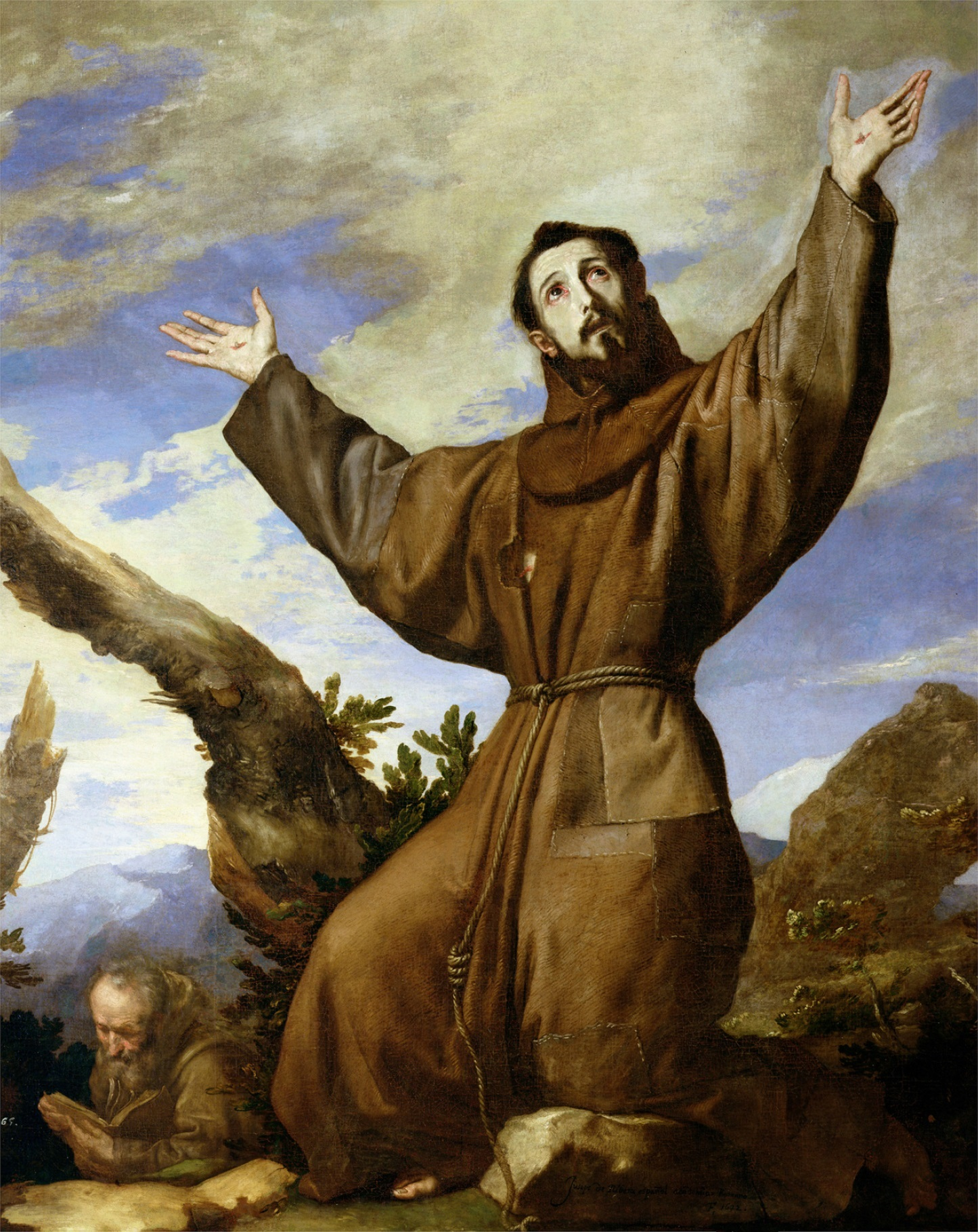 La obra representa a San Francisco de Asís, fundador de la Orden de los franciscanos.